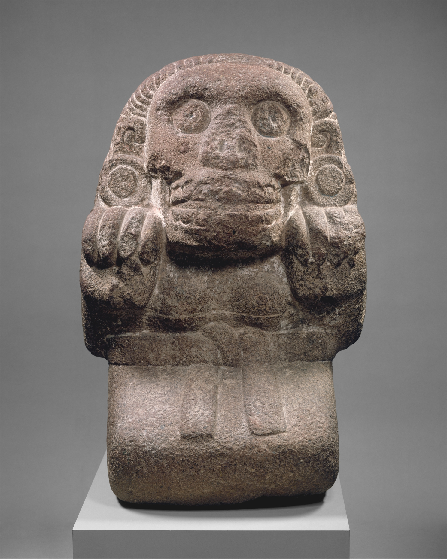 Aztec; Figure; Stone-Sculpture